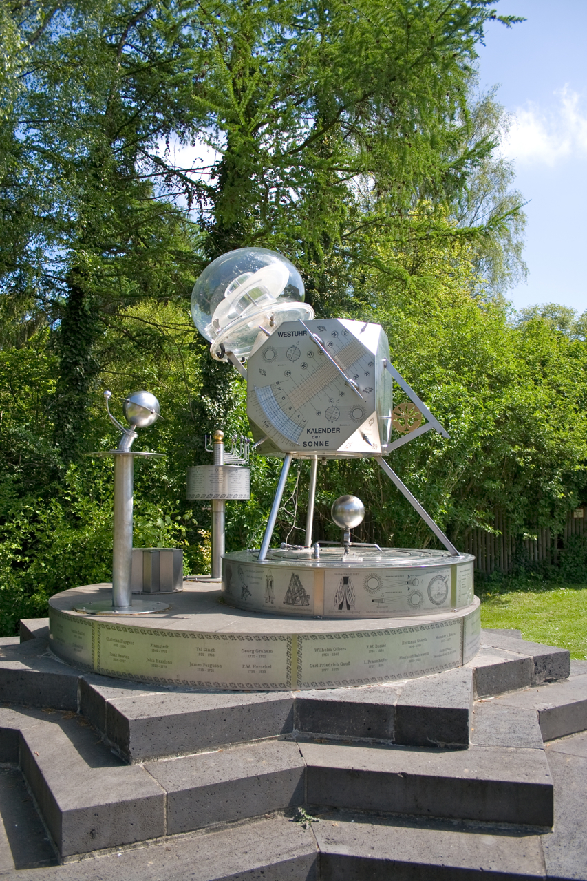 Sonnenuhr in der Gemeinde Wennigsen (Deister), erbaut von Erich Pollähne.